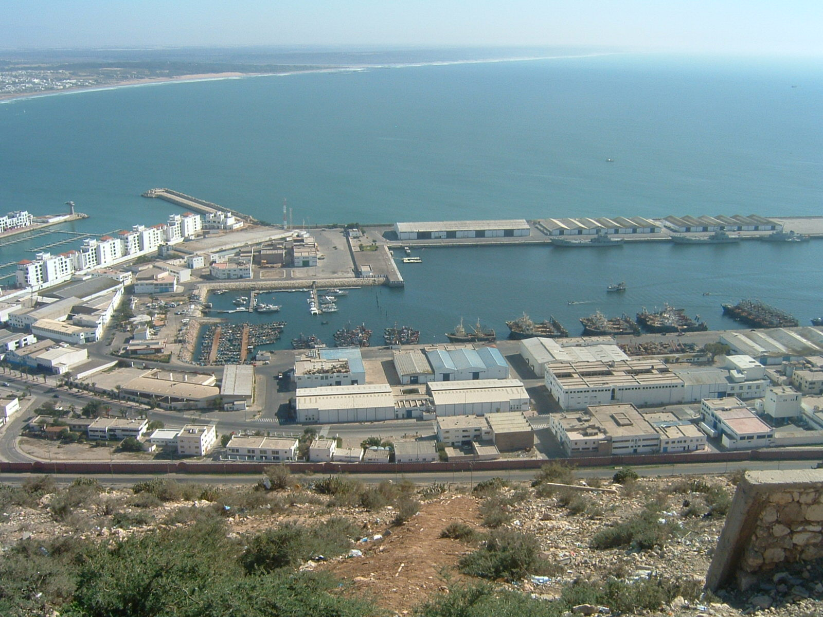 Vue du port d'Agadir depuis la Casbah